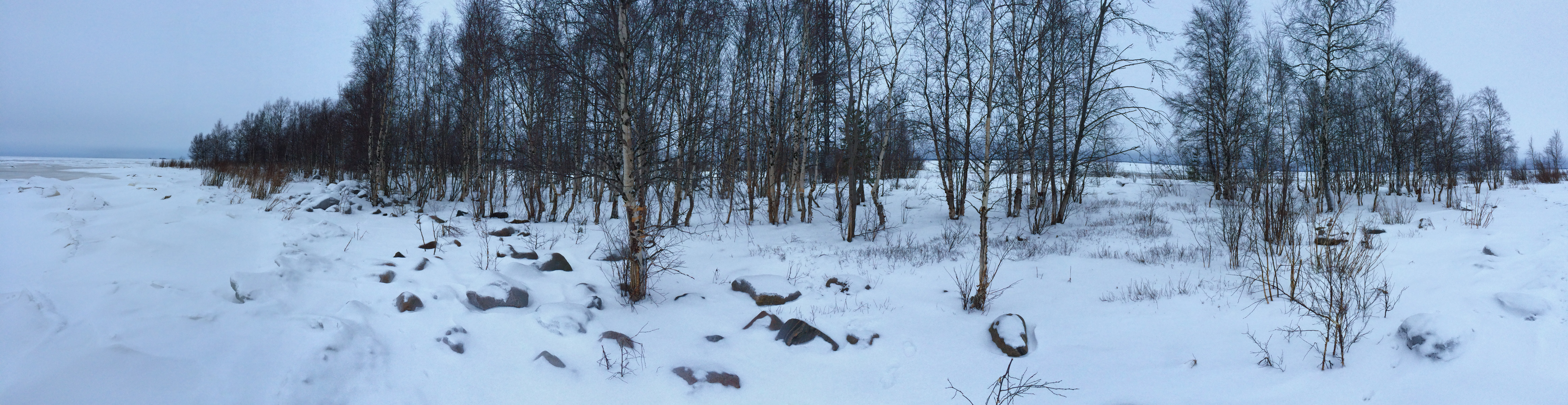 panoraama